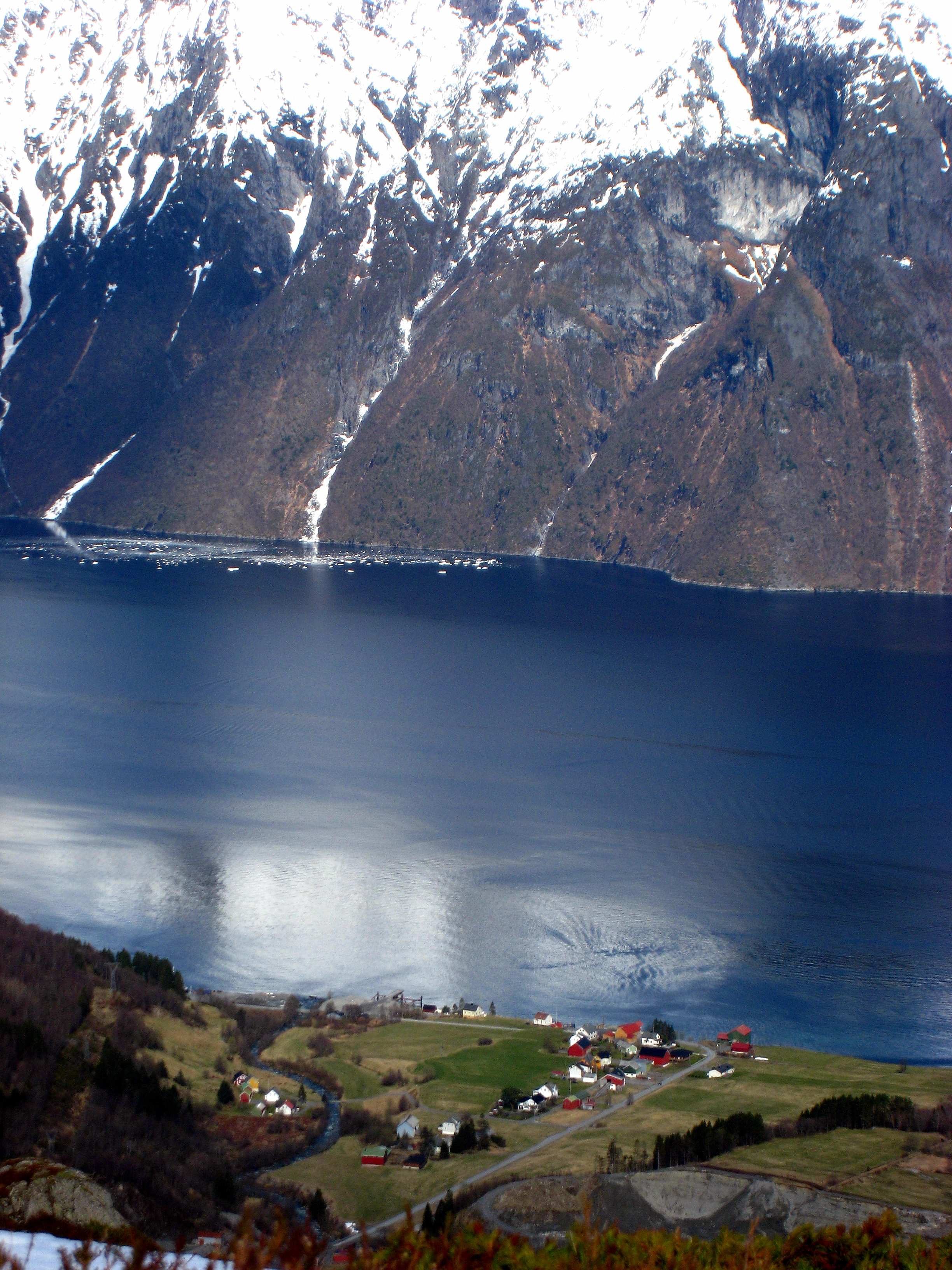 Store-Standal ved Hjørundfjorden. På hi sida har det gått ei snøskrede i fjorden.